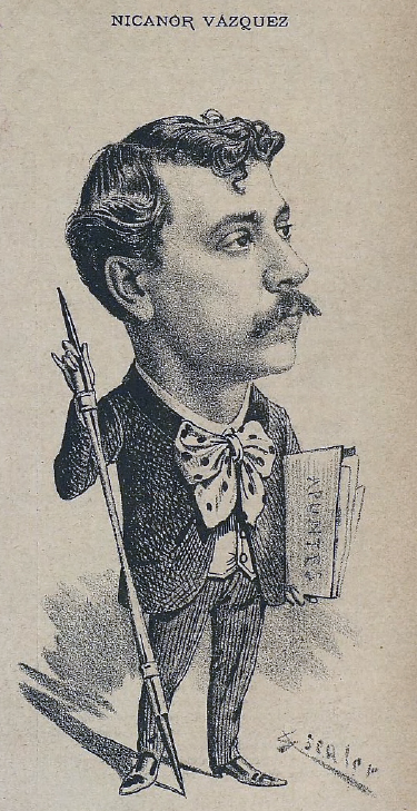 Nicanor Vázquez.